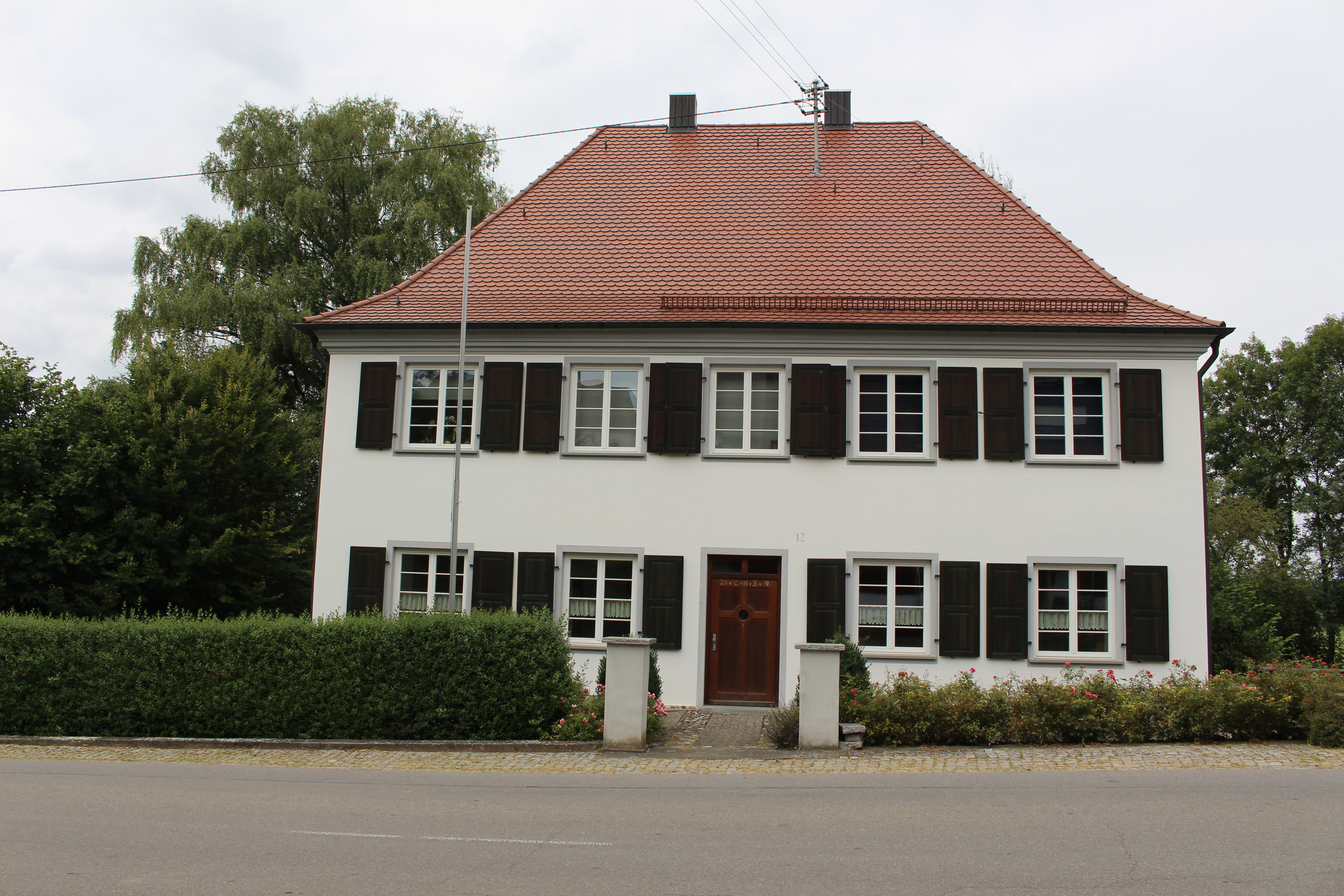 Pfarrhaus, zweigeschossiges, verputztes Gebäude mit Walmdach, regelmäßigen Fensterachsen, Traufgesims, 1811